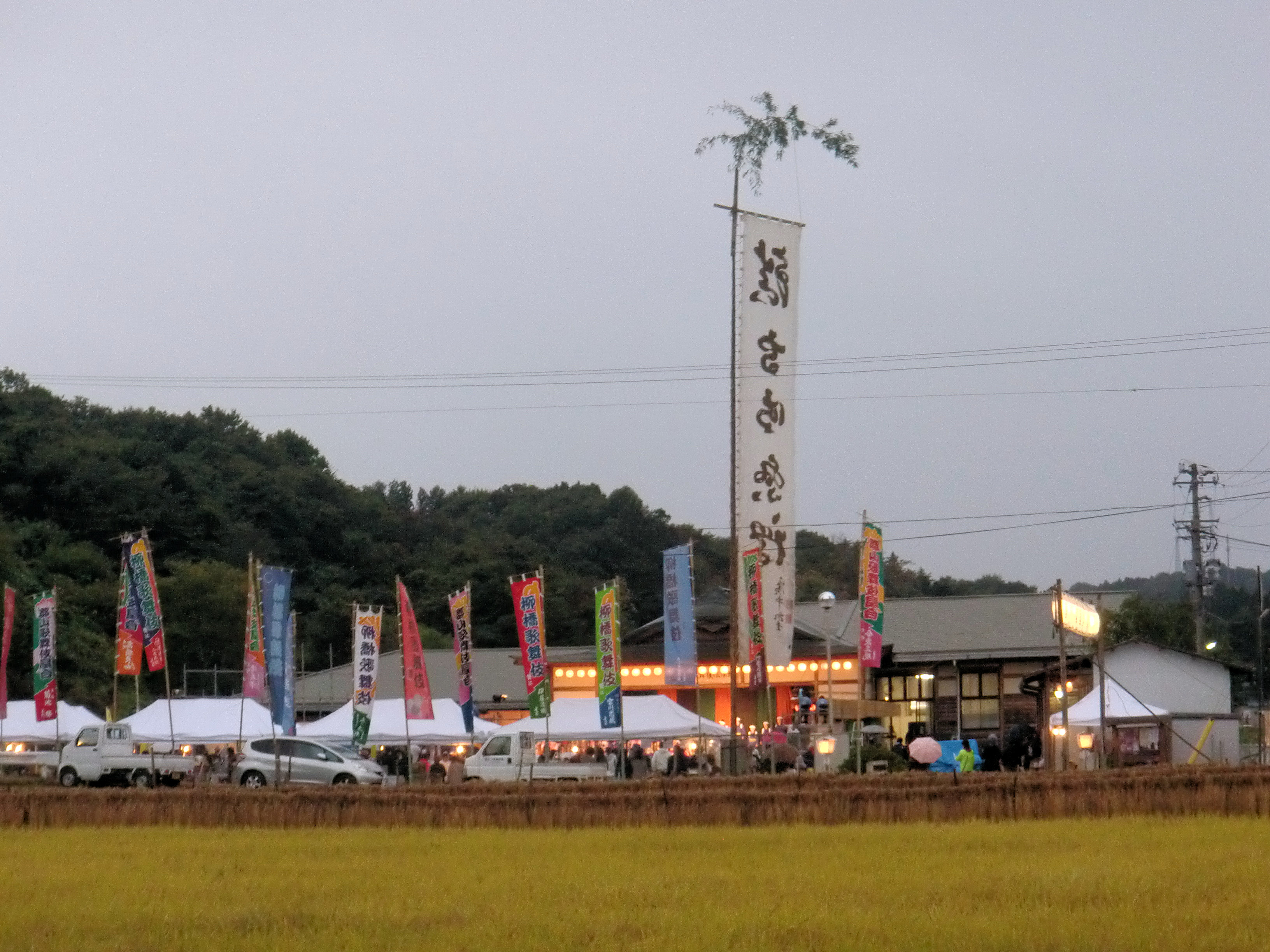 郡山市中田町 柳橋歌舞伎 2017定期公演 柳橋歌舞伎伝承館(黒石荘) 付近の様子